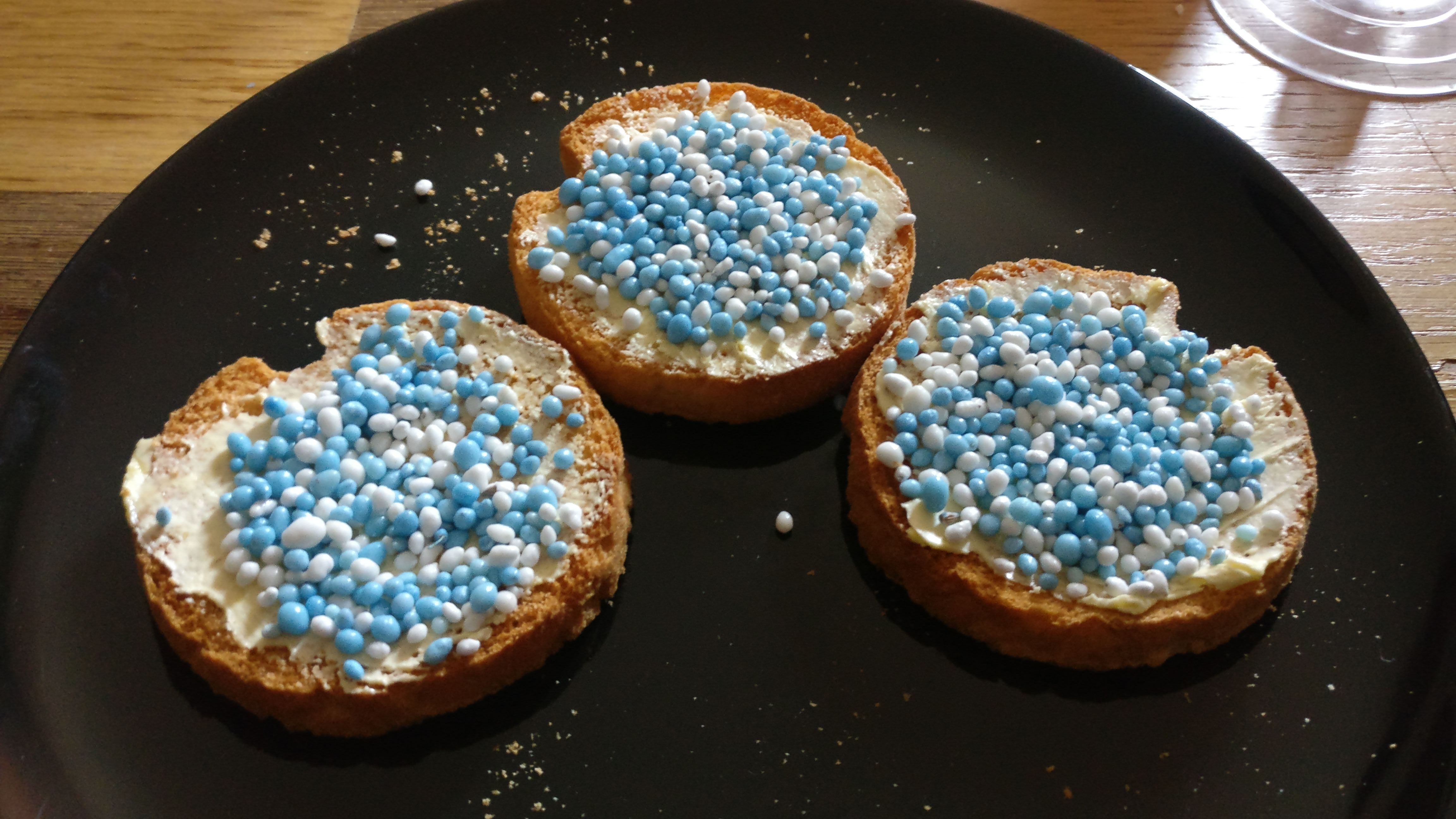 blauwe muisjes op beschuit